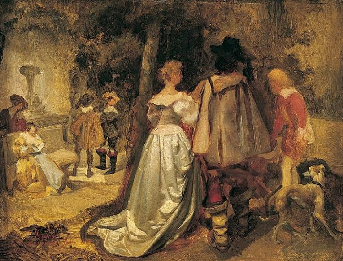 Ignacio León y Escosura, Escena de parque en el siglo XVII, óleo sobre tabla. 28,5 x 36,5 cm, Museo de Zamora. Firmado: "Escosura a su amigo Fabra 1866"